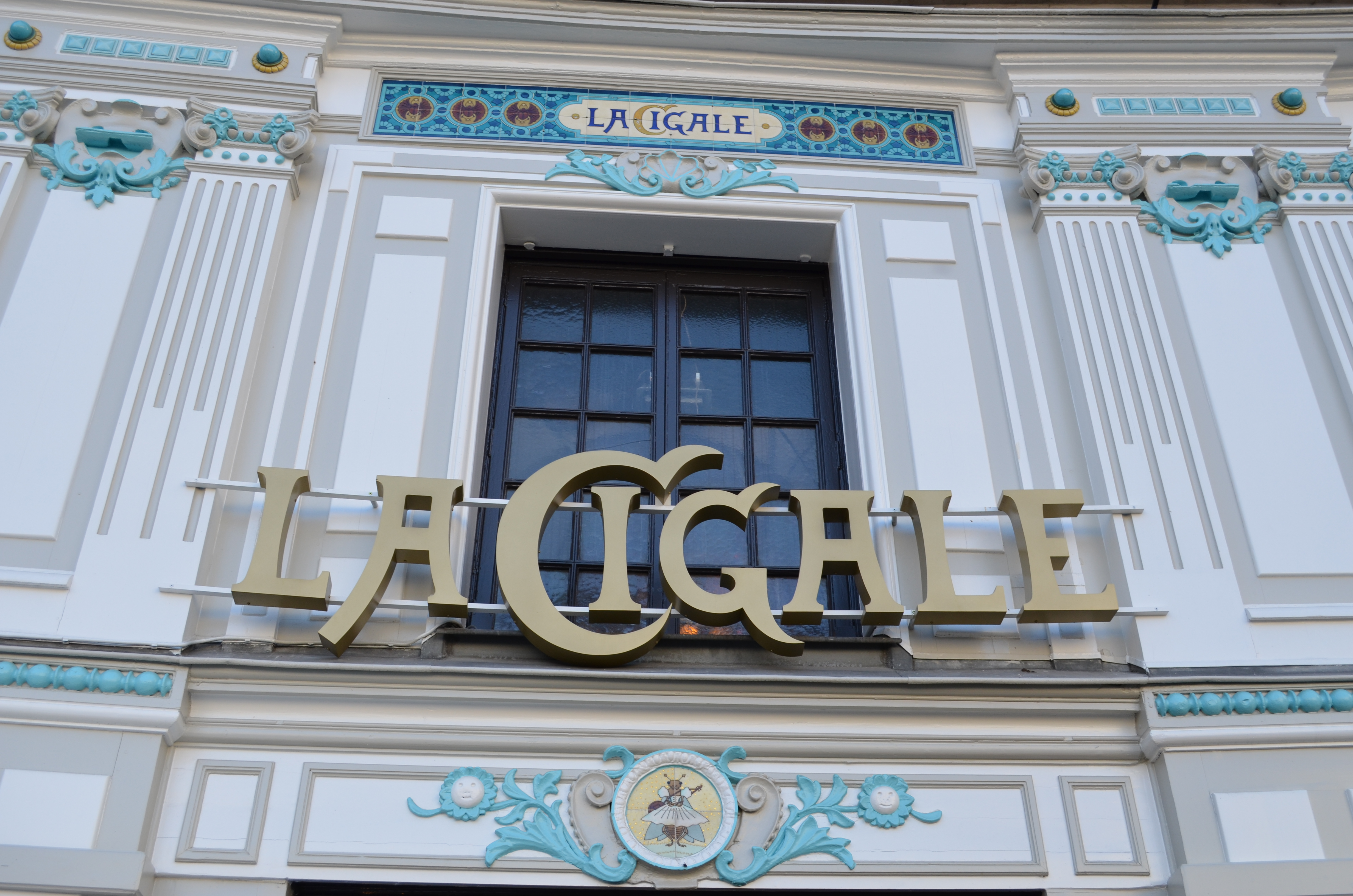 Restaurant déco Art Nouveau (1894) - Nantes .